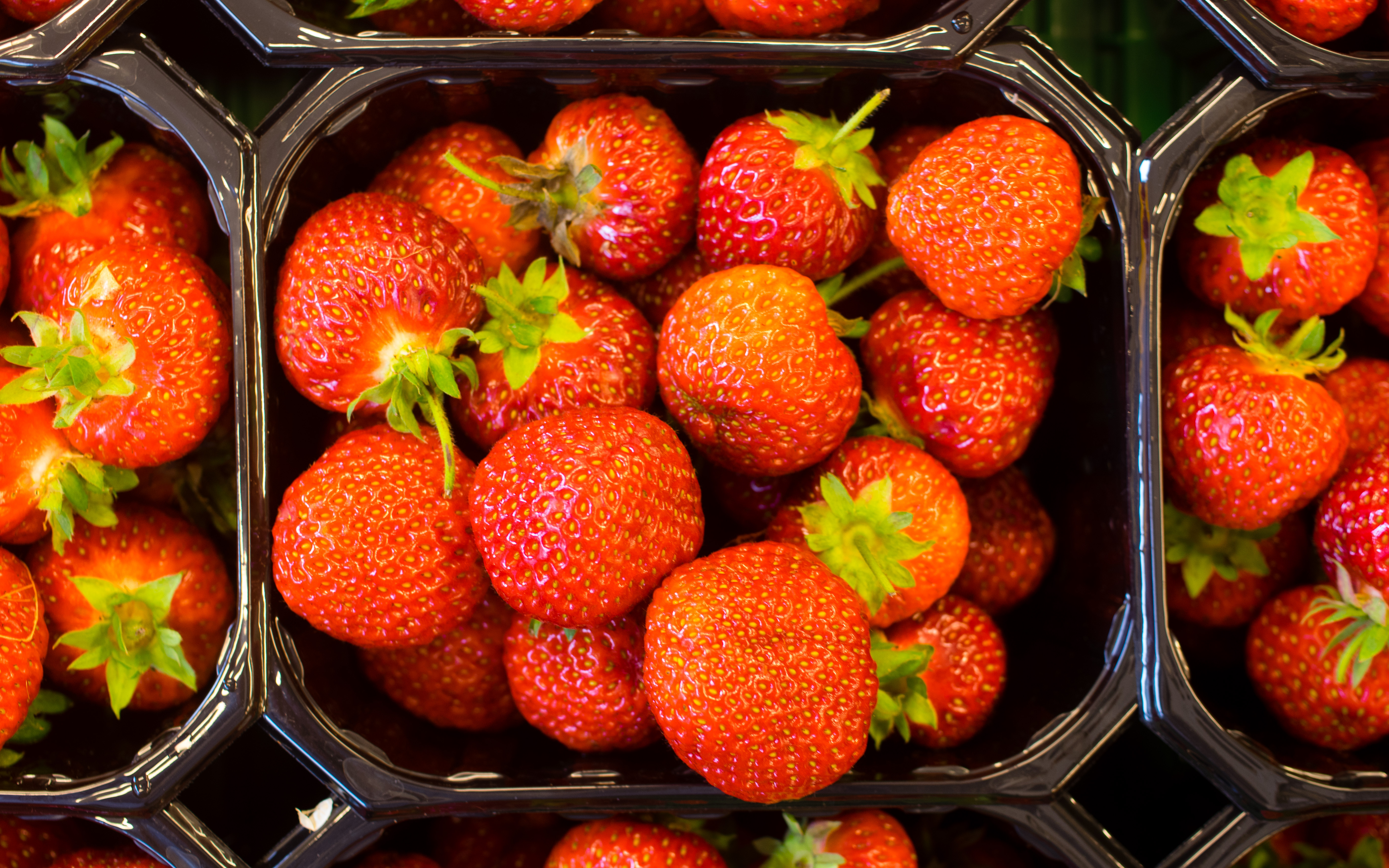 Norske jordbær i kurv.